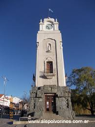 Foto tomada desde el frente del reloj